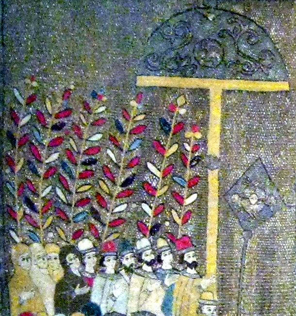 ПЕЛЕНА. ВЫНОС ИКОНЫ «БОГОМАТЕРЬ ОДИГИТРИЯ» Конец XV века Москва Мастерская Елены Стефановны Волошанки (?) Тафта, холст (крашенина), золотосеребряные пряденые нити, цветные шелковые нити; вышивка 95 х 98 (по большим сторонам) Поступила в 1905–1911 годах Находилась в коллекции М.М. Зайцевского, затем П.И. Щукина Реставрирована в 1925 году в ЦГРМ ГИМ инв. 15495щ РБ-5